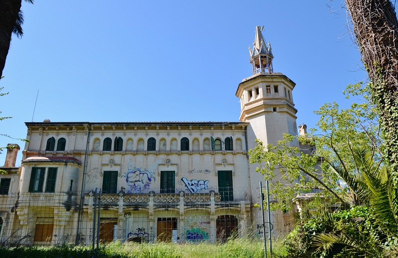 Mas del Pla (Cunit)